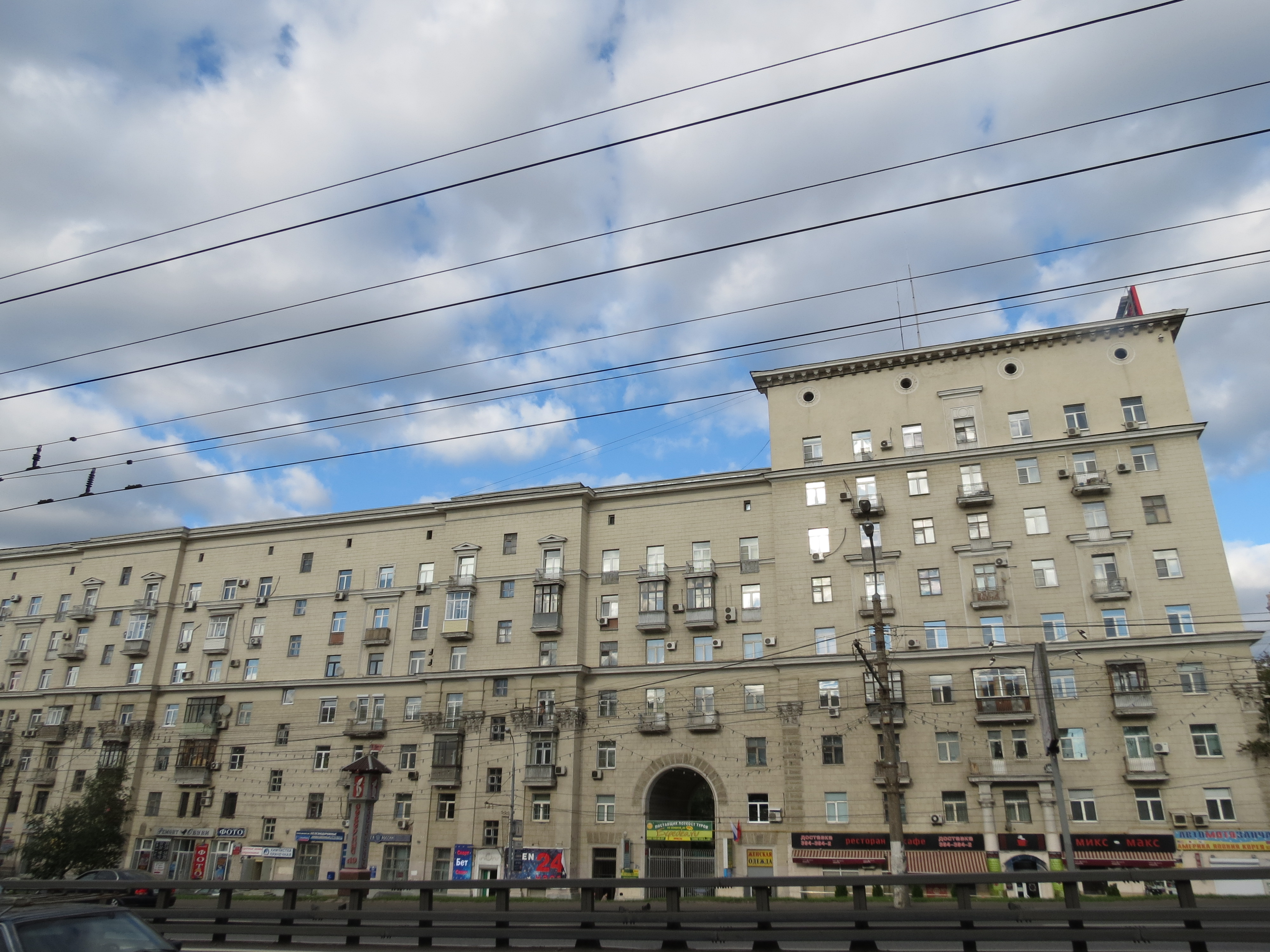 Ленинградское шоссе, дом 8/2.